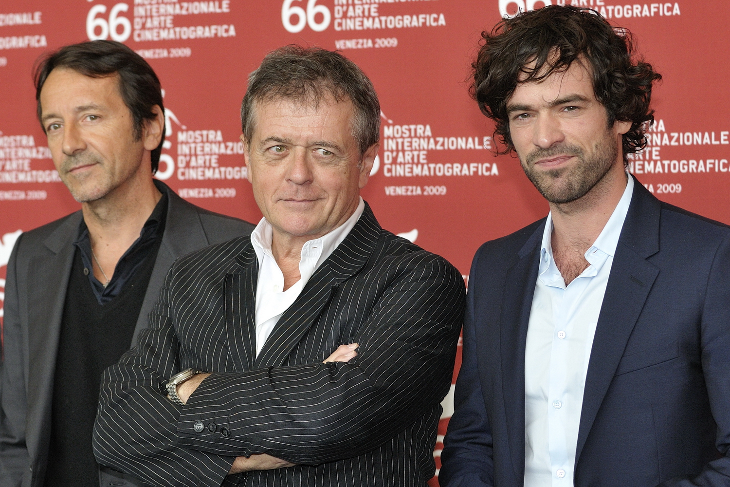 66ème Festival du Cinéma de Venise (Mostra), 4ème jour (05/09/2009) Photocall avec avec Romain duris, Jean-Hugues Anglade, Patrice Chéreau (réalisateur) pour le film : Persécution